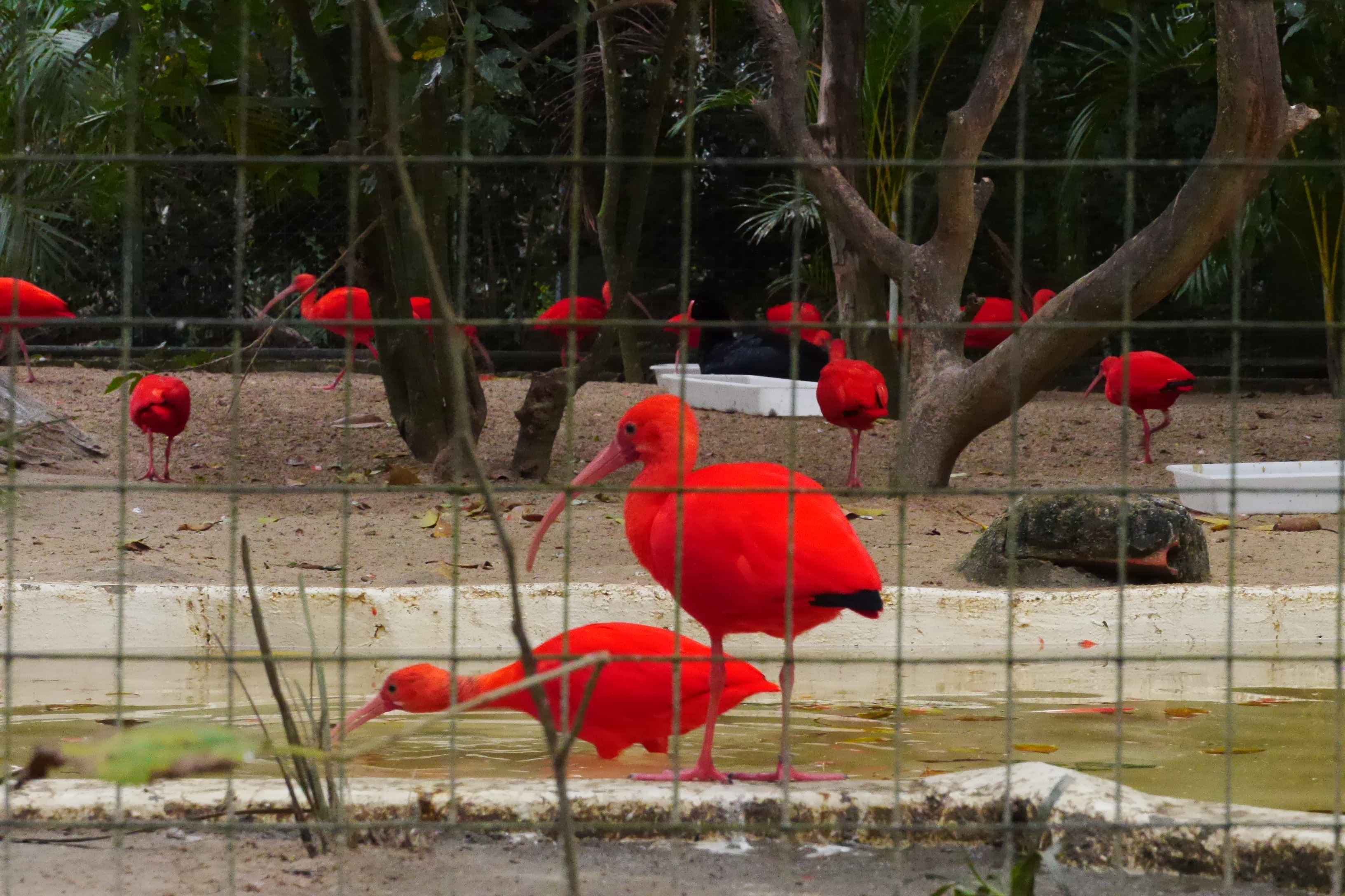 Flamingos, uma das várias espécies de animais presentes no zoológico de Pomerode